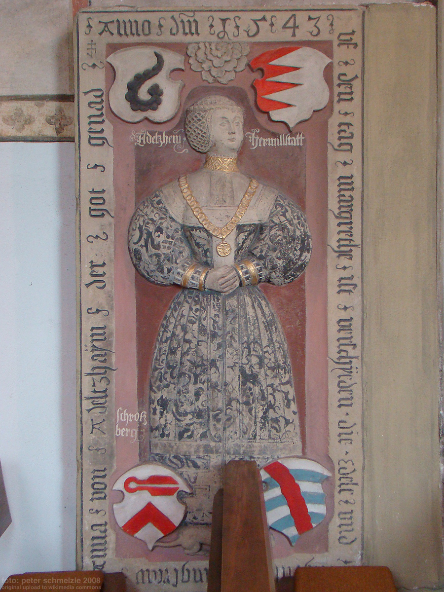 Historische Grabplatte in der Notburgakirche in Haßmersheim-Hochhausen